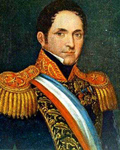 Retrato del presidente chileno José Joaquín Prieto